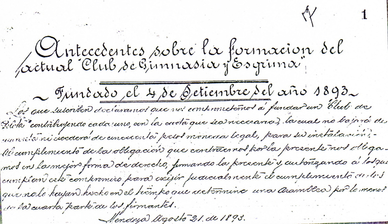 Primeras fundaciones de Gimnasia de Mendoza